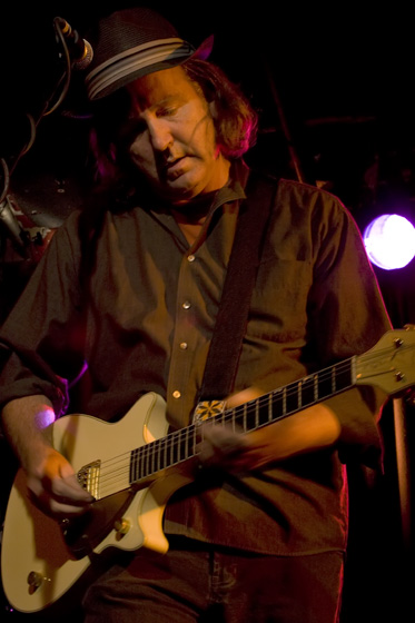 Jim Moginie A Very Big Gig (benefit for Wayne Goodwin) The Basement, Sydney August 2008